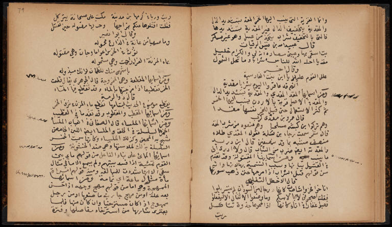 فيروزآبادي أبو طاهر مجد الدين محمد بن يعقوب بن محمد بن إبراهيم بن عمر الشيرازي الإمام اللغوي الشهير ولد بكارَِزين وهي بلدة بفارس ـ وقد صرح هو بذلك في مادة ك ر ز ـ سنة تسع وعشرين وسبعمائة هجرية ، أي في فترة العصر المغولي الذي بدأ بسقوط بغداد في قبضة التتار على يد هولاكو سنة 656 هـ ، وانتهى بدخول العثمانيين مصر سنة 923هـ ، وجاءت ولادته بعد وفاة "ابن منظور" صاحب "لسان العرب" بثماني عشرة سنة. كتابه هذا إسمه الجليس الأنيس في أسماء الخندري من كتبه الإخرى . القاموس المحيط. . تحبير المُوشِّين في التعبير بالسين والشين . وهو مطبوع. . شرح قصيدة بانت سعاد في مجلدين. . الروض المسلوف فيما له اسمان إلى ألوف. .الدرر المبثَّثة في الغرر المثلثة . وهو مطبوع . المثلث الكبير في خمسة مجلدات. . أنواء الغيث في أسماء الليث. . مقصود ذوي الألباب في علم الإعراب. . أسماء السراح في أسماء النكاح. . بصائر ذوي التمييز في لطائف الكتاب العزيز . وهو مطبوع. . تفسير فاتحة الكتاب. . حاصل كورة الخلاص في فضائل سورة الإخلاص. . تنوير المقباس في تفسير ابن عباس . وهو مطبوع. . روضة الناظر في ترجمة الشيخ عبد القادر. . المرقاة الوفية في طبقات الحنفية. . المرقاة الأرفعية في طبقات الشافعية. . البلغة في تراجم أئمة النحاة واللغة . وهو مطبوع. . نزهة الأذهان في تاريخ أصبهان. . شوارق الأسرار العلية في شرح مشارق الأنوار النبوية. . منح الباري بالسيل الفسيح الجاري في شرح صحيح البخاري. . تسهيل طريق الوصول إلى الأحاديث الزائدة على جامع الأصول . . الأحاديث الضعيفة. . الدر الغالي في الأحاديث العوالي. . الصلات والبشر في الصلاة على خير البشر . وهو مطبوع. . سفر السعادة ، وهو مطبوع. . عدة الحكام في شرح عمدة الأحكام. . الإسعاد بالإصعاد إلى درجة الاجته مات رحمه الله في زَبيد ليلة الثلاثاء من شوال سنة 817 هـ ، وقد ناهز التسعين ، ولم يزل إلى حين موته متمتعًا بسمعه وبصره ، متوقِّد الذهن ، حاضر العقل . قال السخاوي : وكان يرجو وفاته بمكة فما قُدِّرَ له ذلك . ودُفِنَ بتربة الشيخ إسماعيل الجبرتي. User:Tarawneh/rami